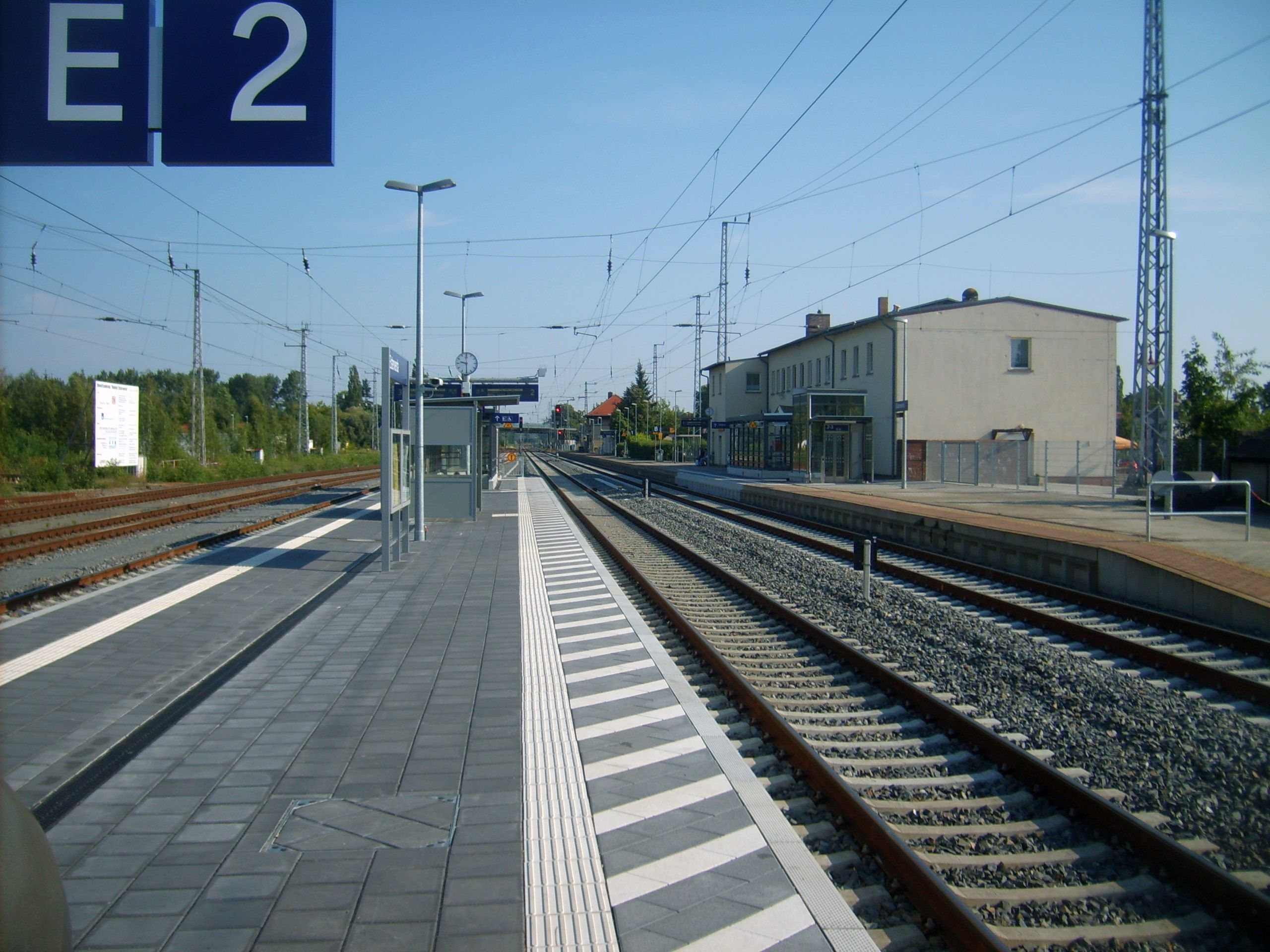 Der umgebaute Bahnhof in Elsterwerda.